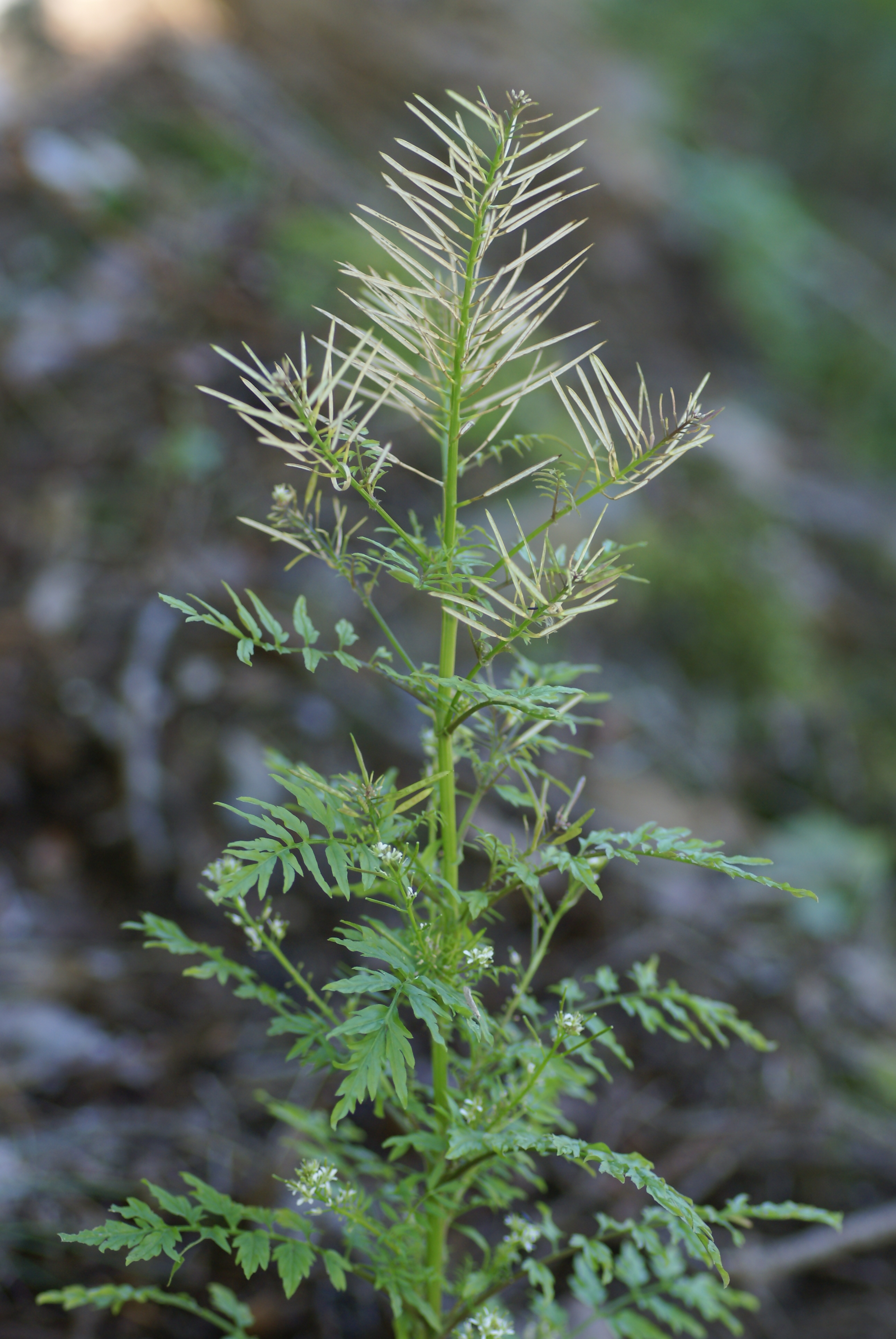 Plant species Cardamine_impatiens